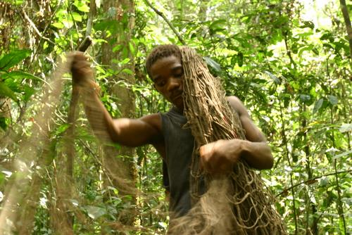 Chasseur pygmé bambuti, près d'Epulu, 2005